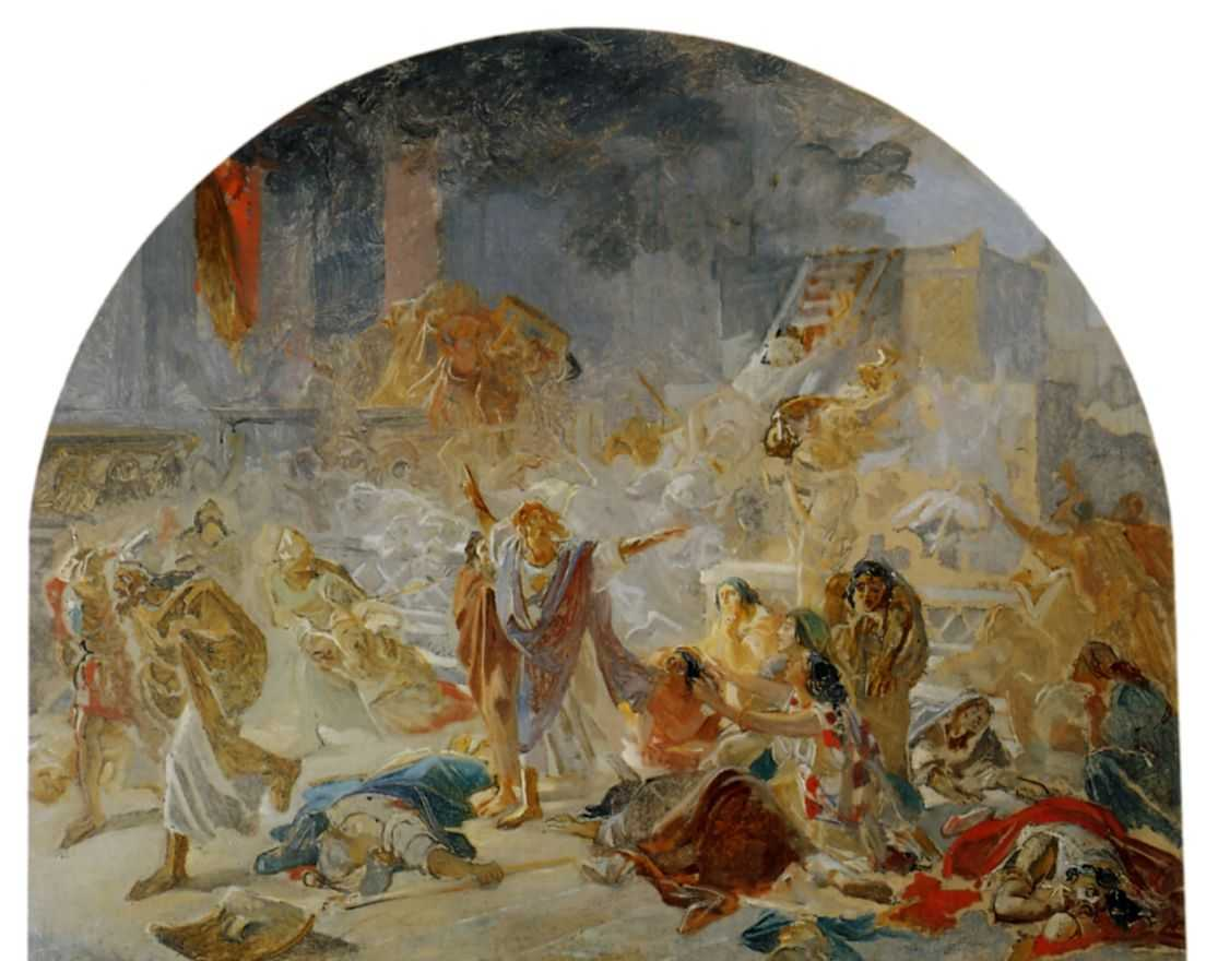 Ге Николай. Разрушение Иерусалимского храма. 1859